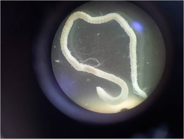 Branchiura cinsindən olan azqıllı qurdun mikroskop altında görünüşü